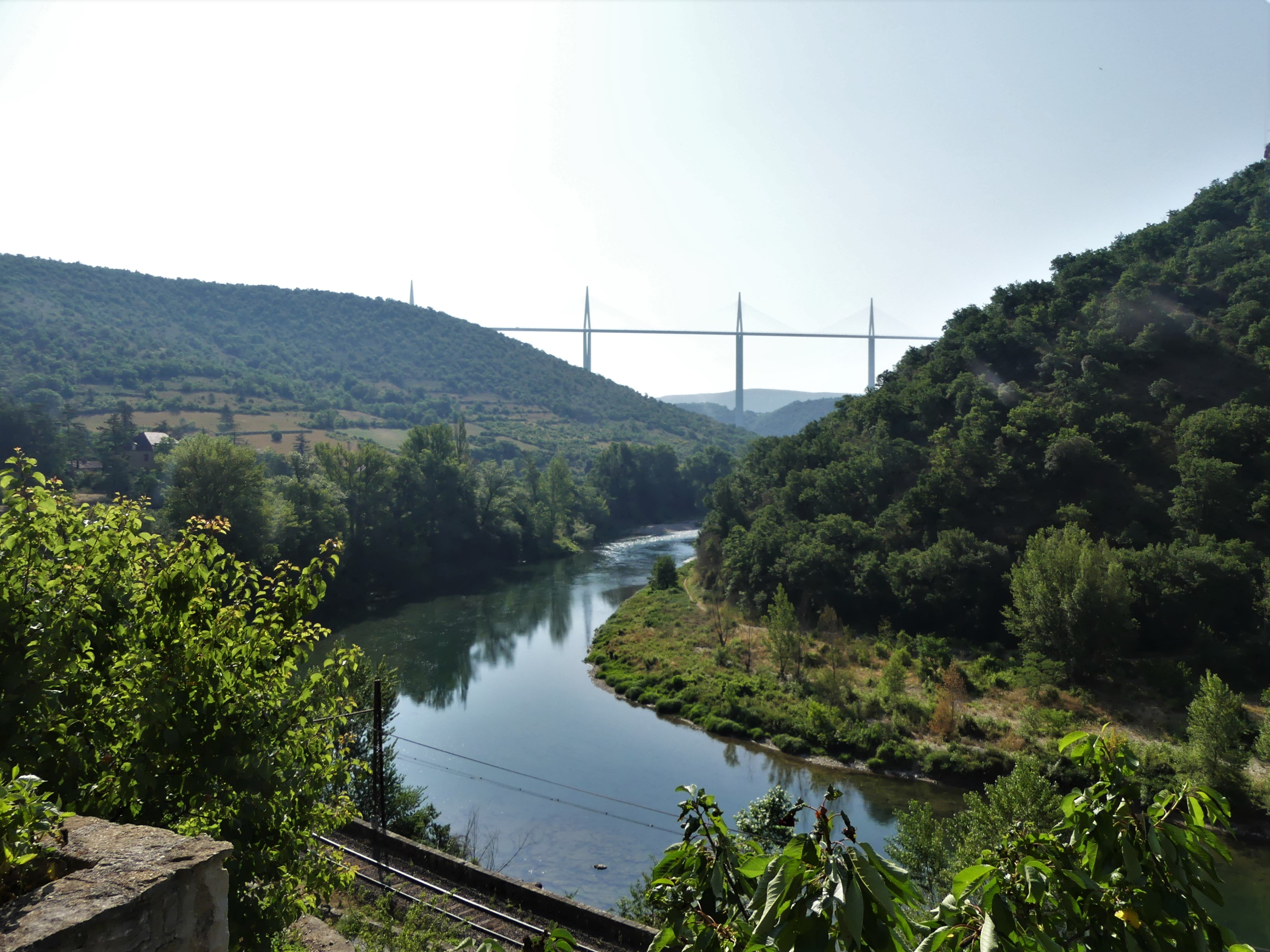 Le Tarn au niveau du village de Peyre, Comprégnac, Aveyron, France. Vue prise en direction de l"amont et du viaduc de Millau. En rive opposée, la commune de Saint-Georges-de-Luzençon.